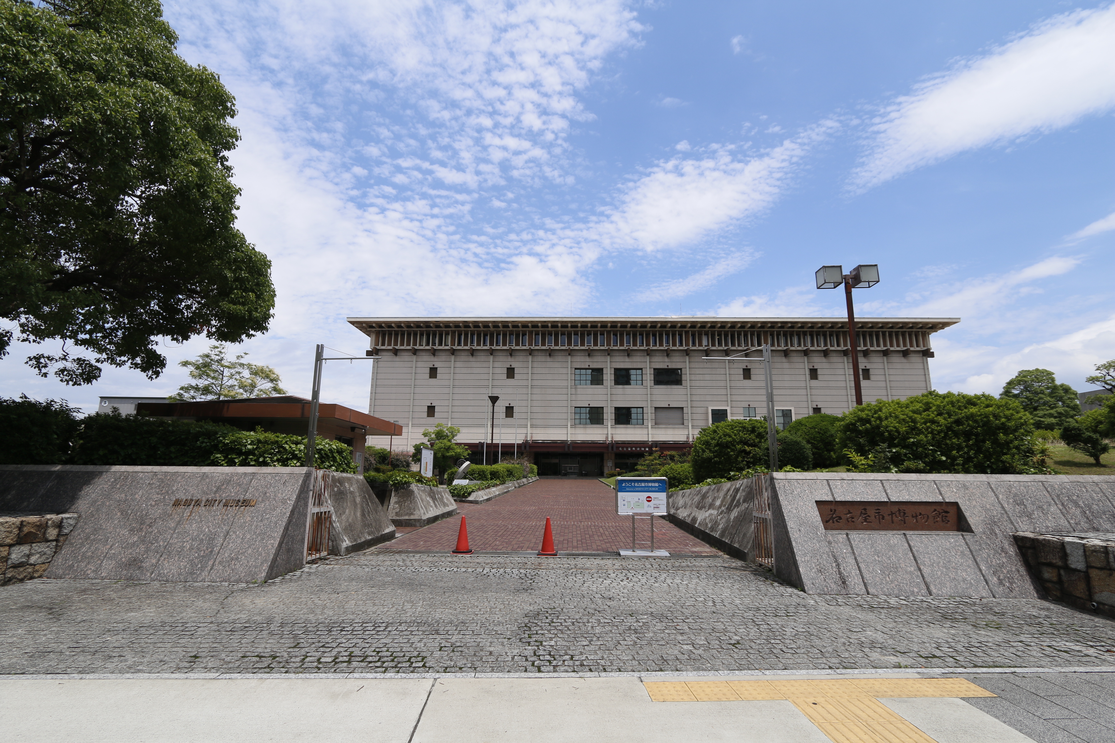 nagoya city museum2017